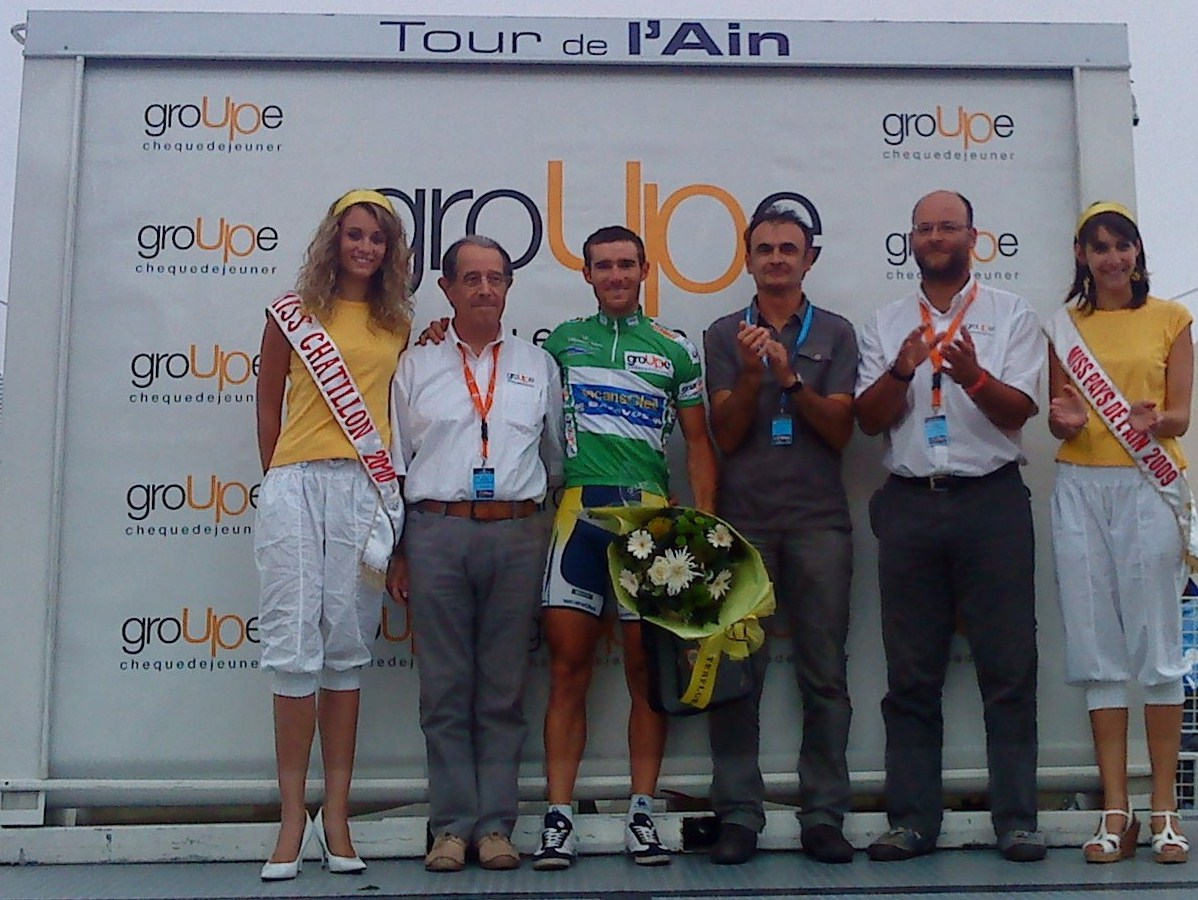 Classement final du Tour de l'Ain 2009 : maillot vert remporté par Romain Feillu.